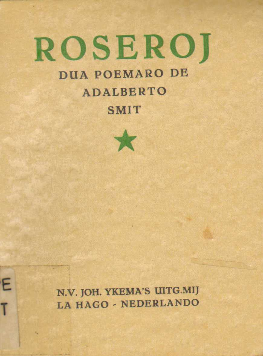 librokovrilo de "Roseroj", 1930